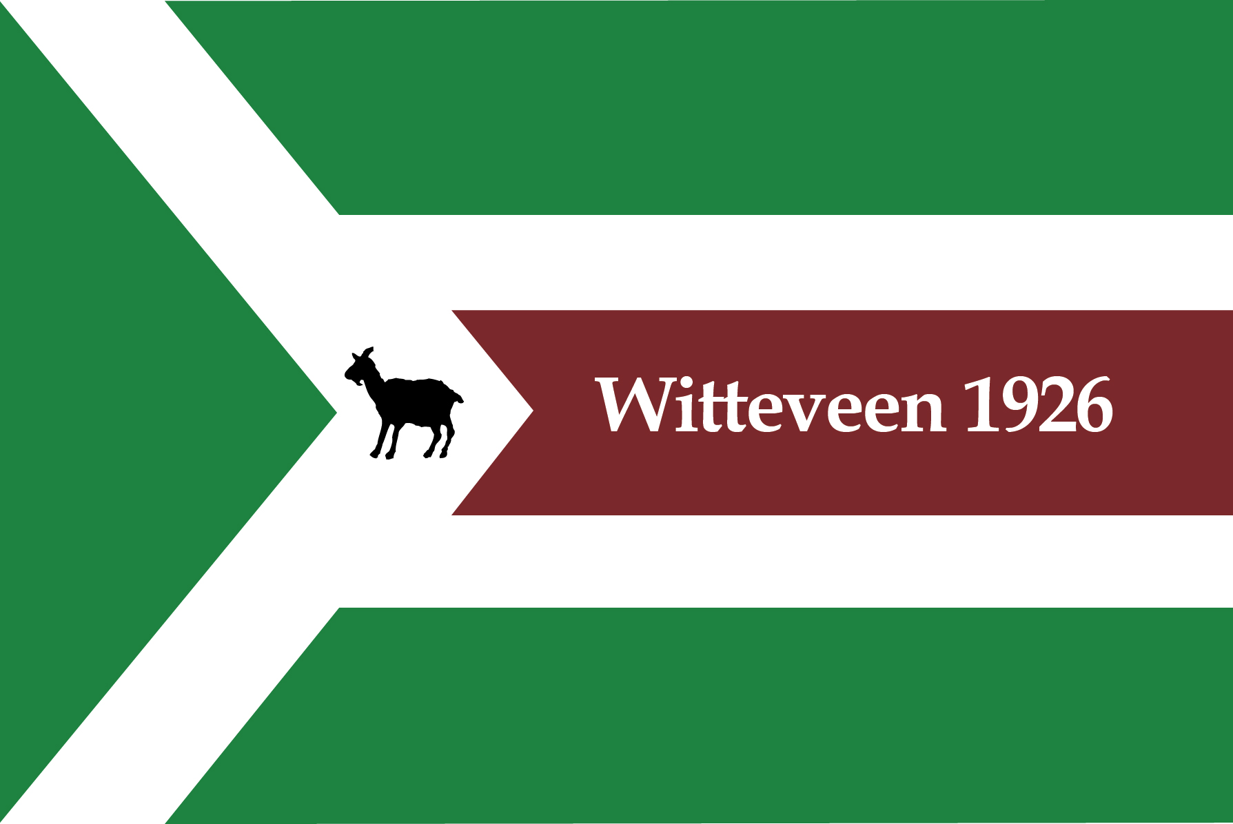 Officiële dorpsvlag van Witteveen